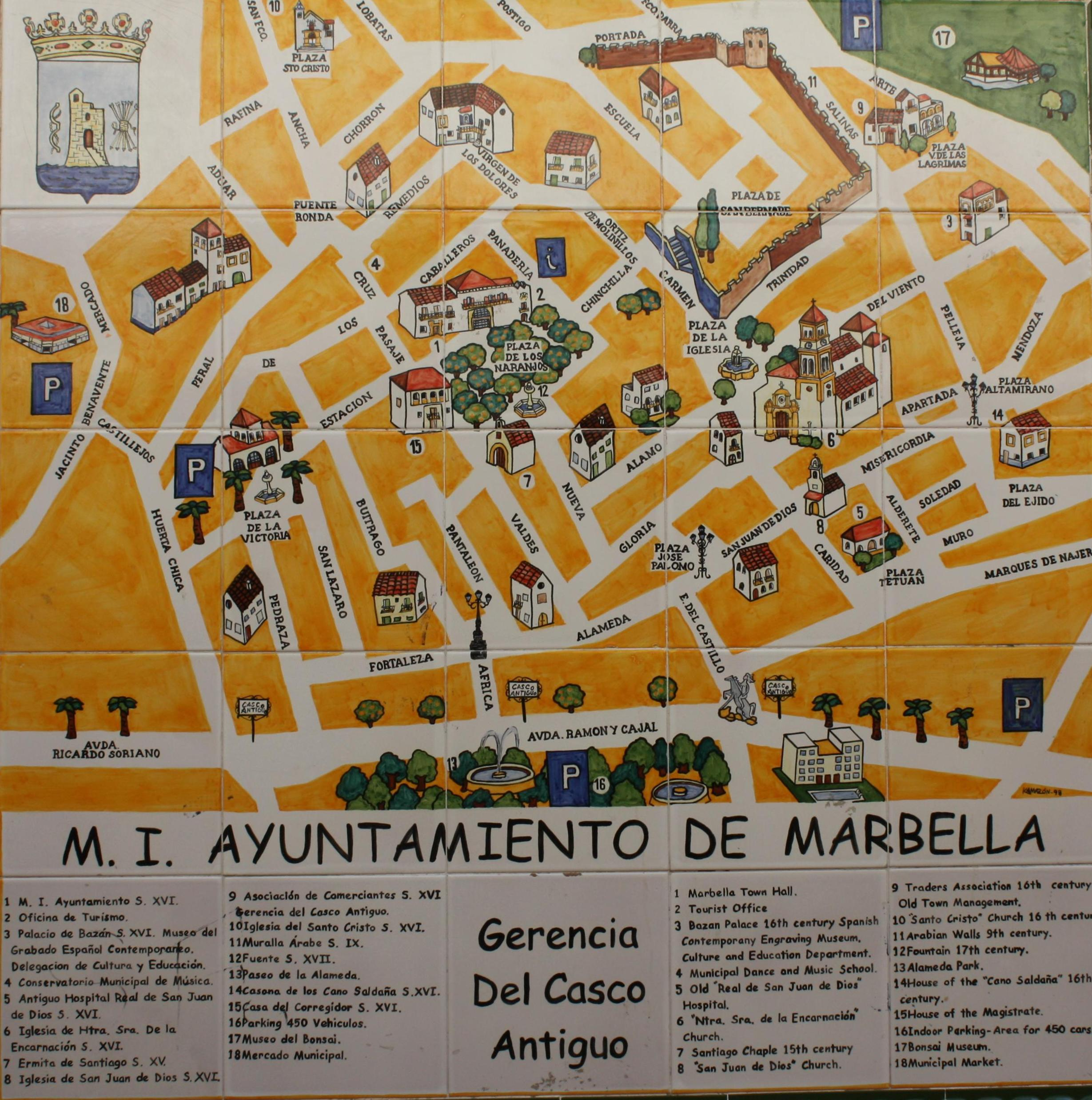 Plano de información turística del casco antiguo de Marbella, España.